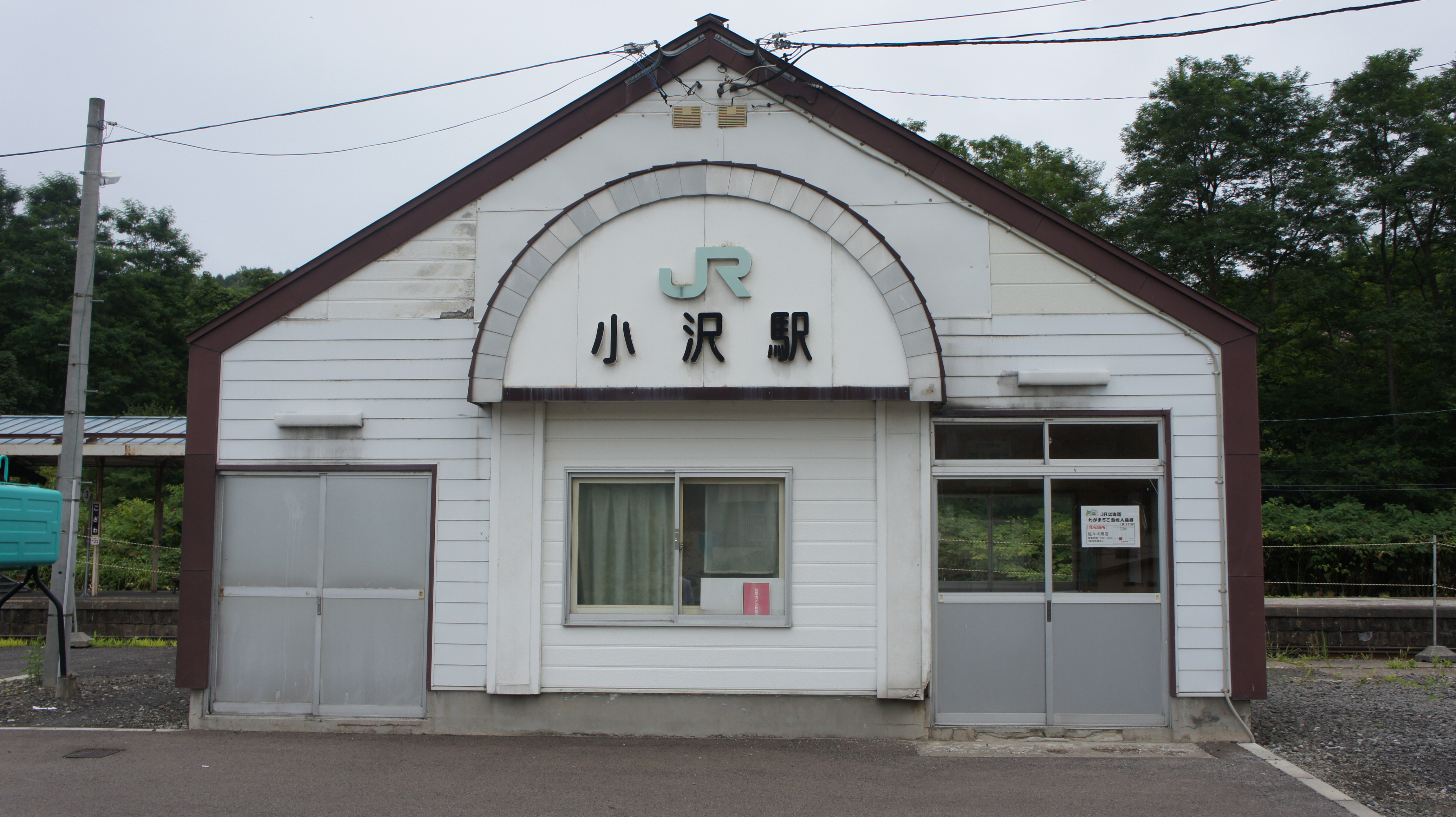 JR函館本線・小沢駅の駅舎